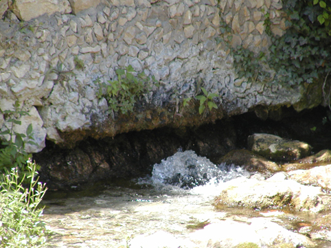 Eine der Quellen